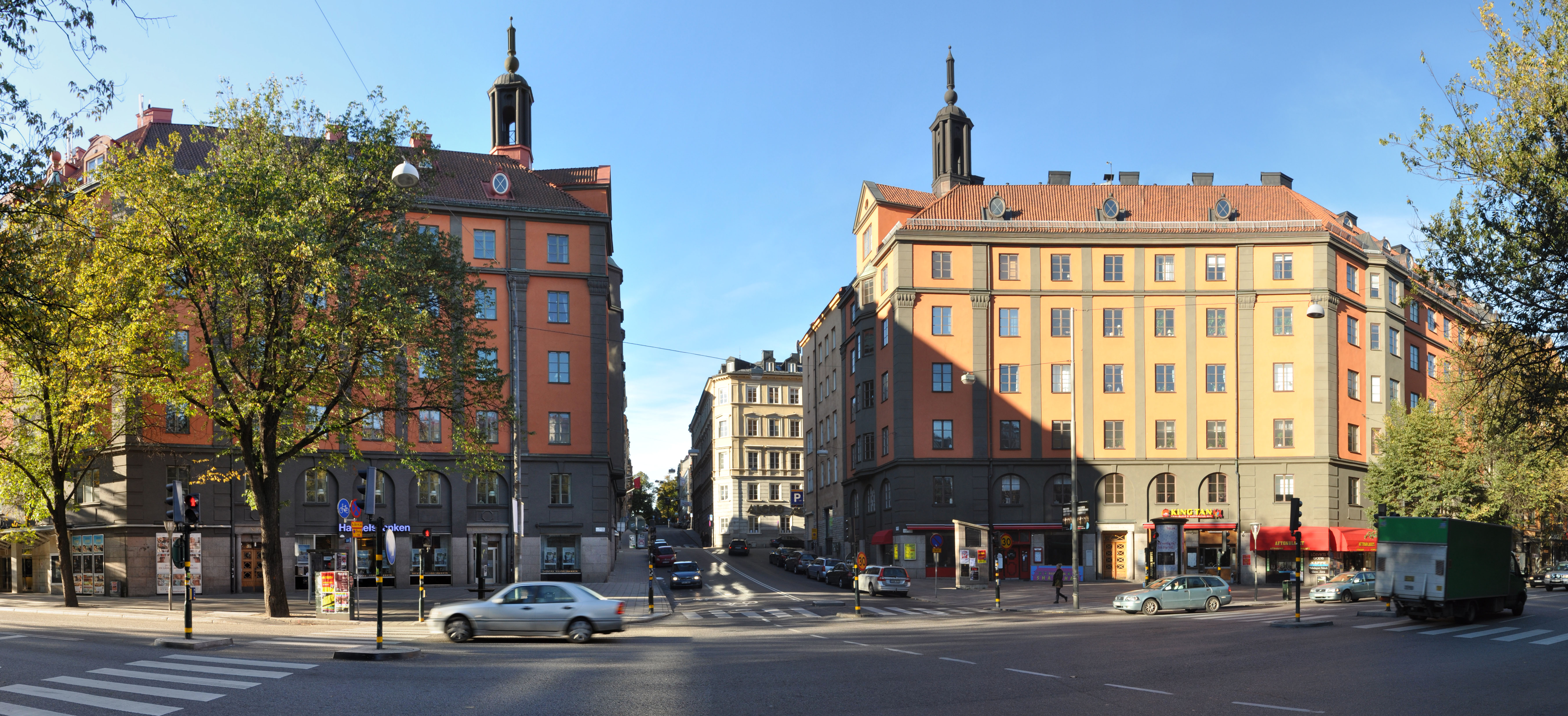 Sveavägen 45-47, Panorama. Byggnadsår 1920-21 resp. 1920-24 , arkitekter Höög & Morssing